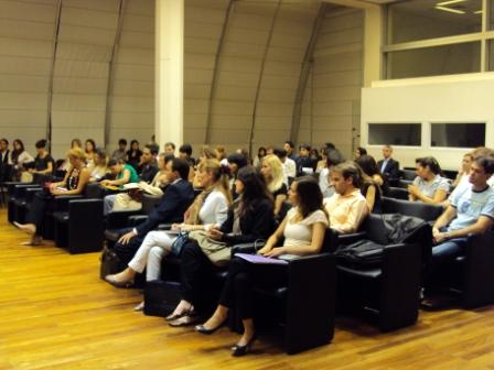 Charlas Informativas para el Concurso de Ingreso al Instituto del Servicio Exterior de la Nación